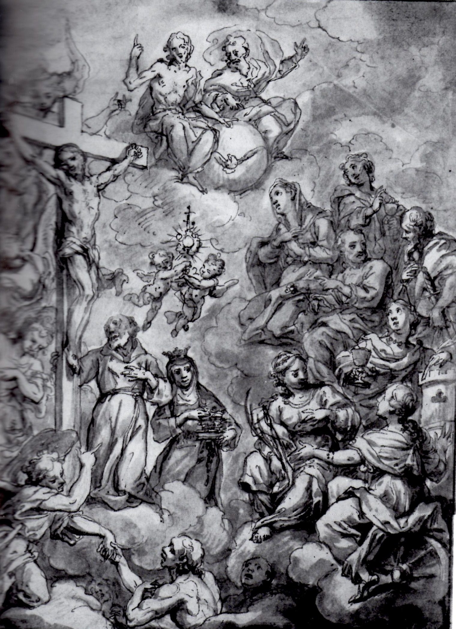 Monaco, disegno preparatorio